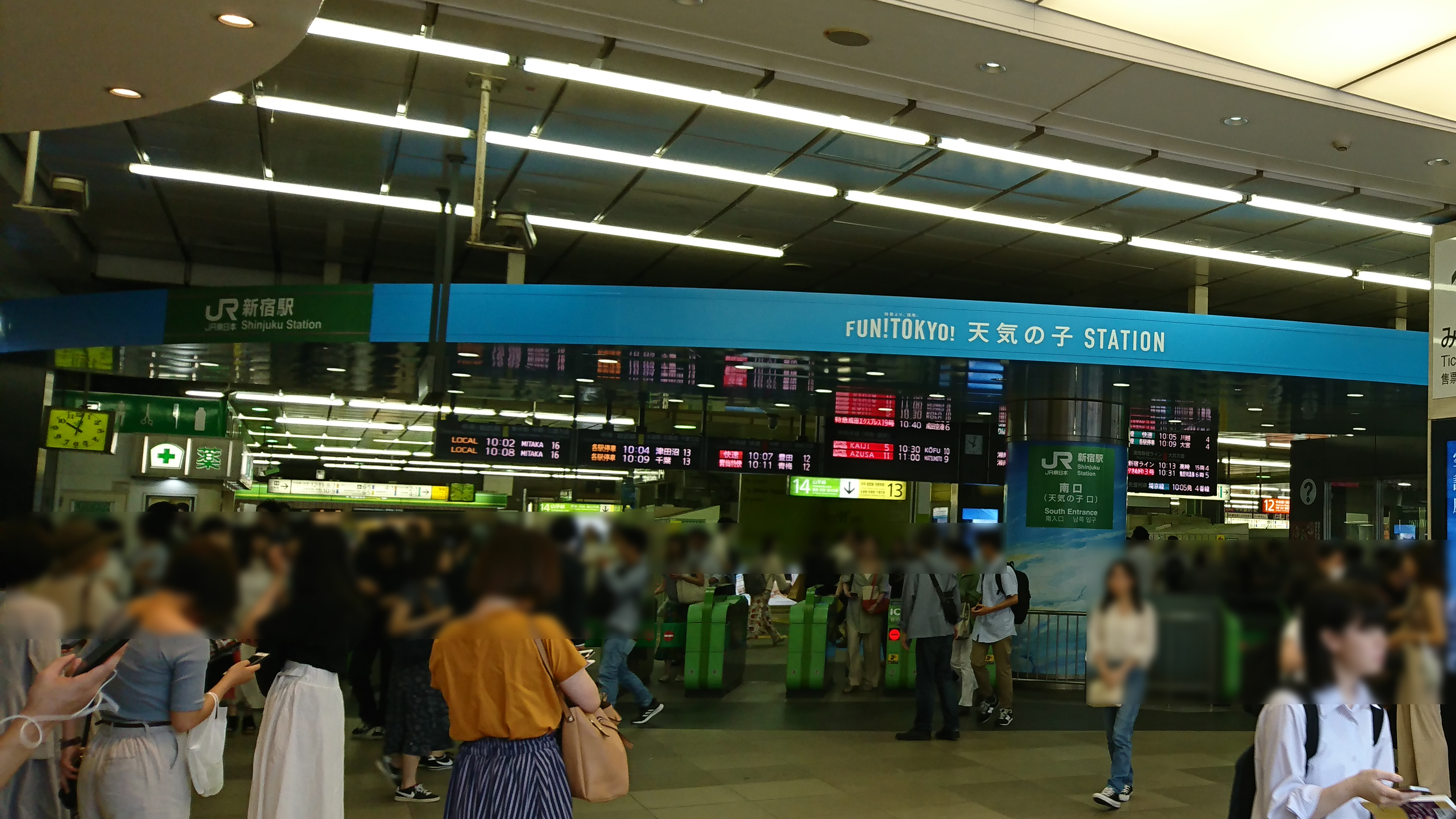 JR新宿駅南口にて、映画作品『天気の子』のプロモーションが期間限定で行われた際の様子。